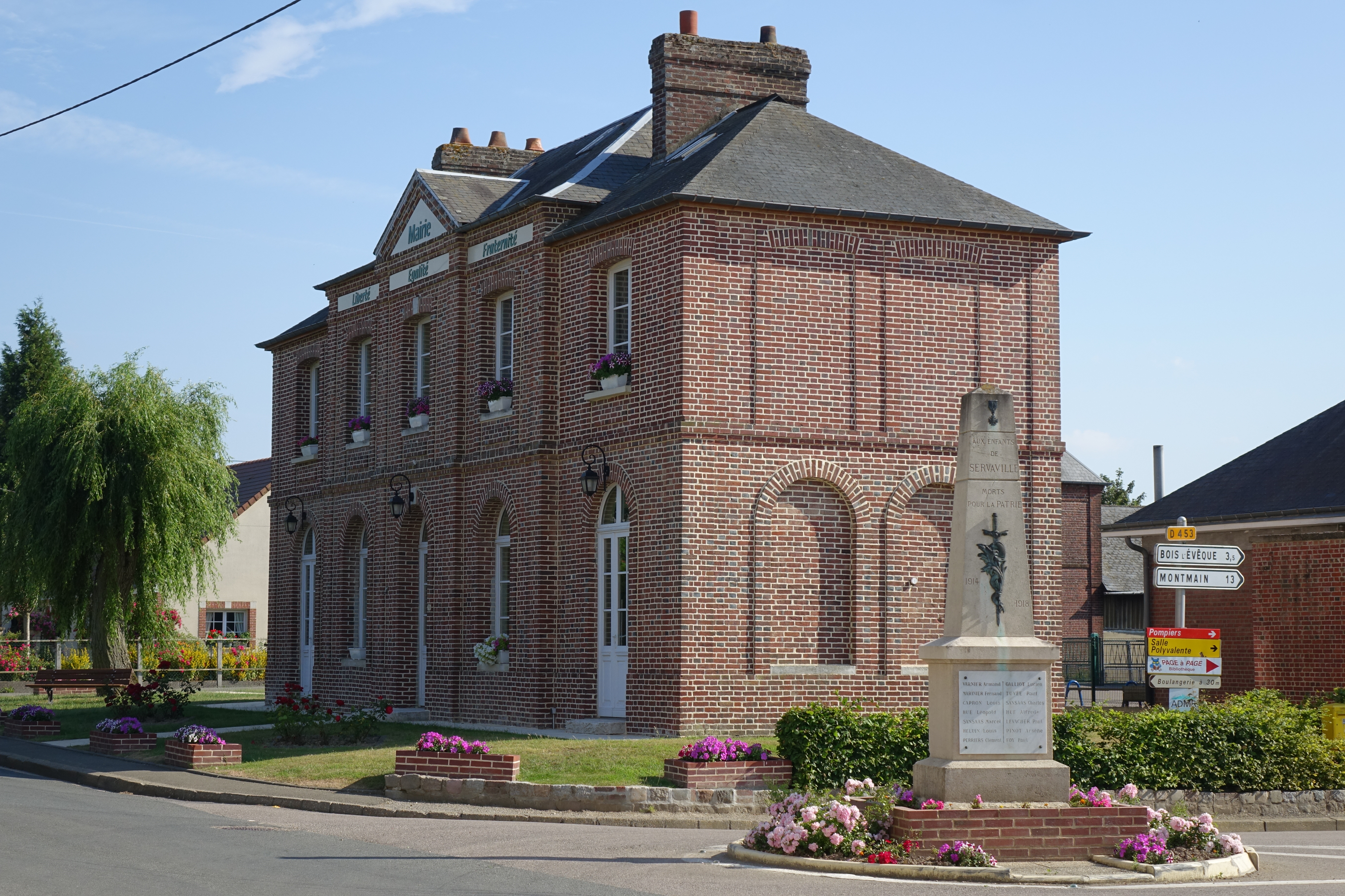 Mairie de Servaville-Salmonville, Seine-Maritime, France